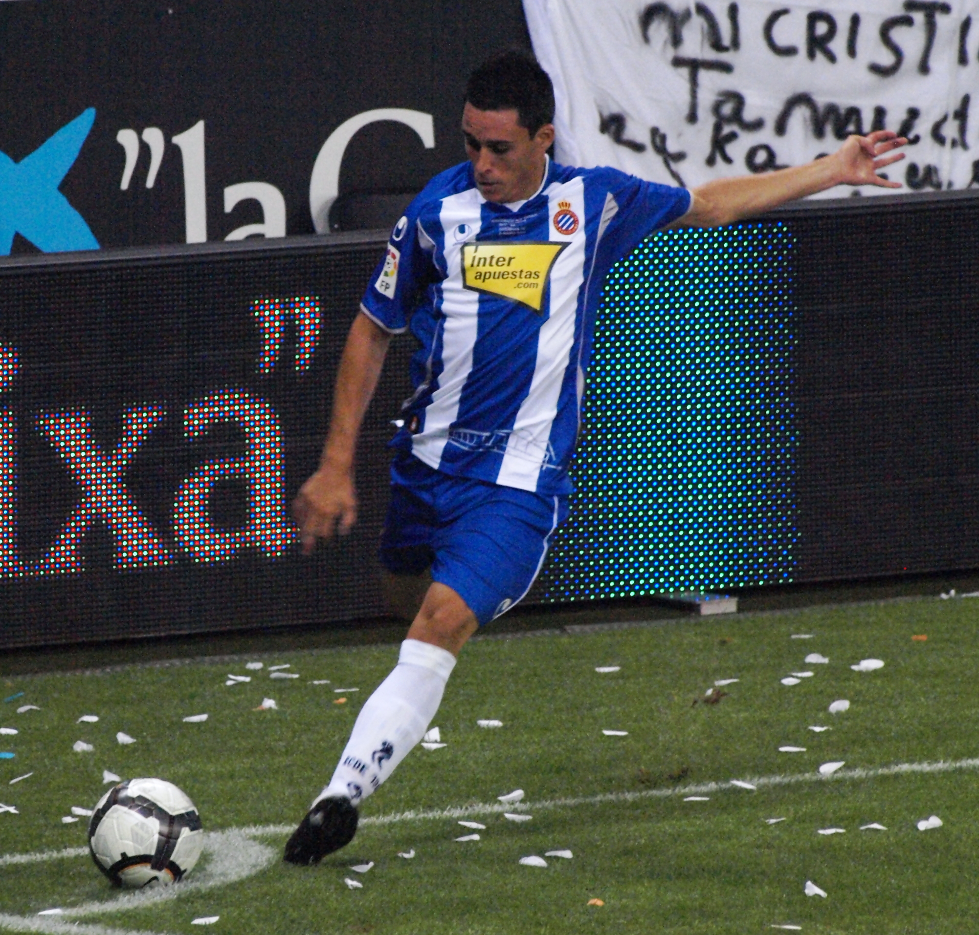 José Callejón del RCD Espanyol, lanzando un corner en el encuentro que enfrentó a su club con el Liverpool FC, que sirvió para dar por inagurado oficialmente el Estadio de Cornellà-El Prat.